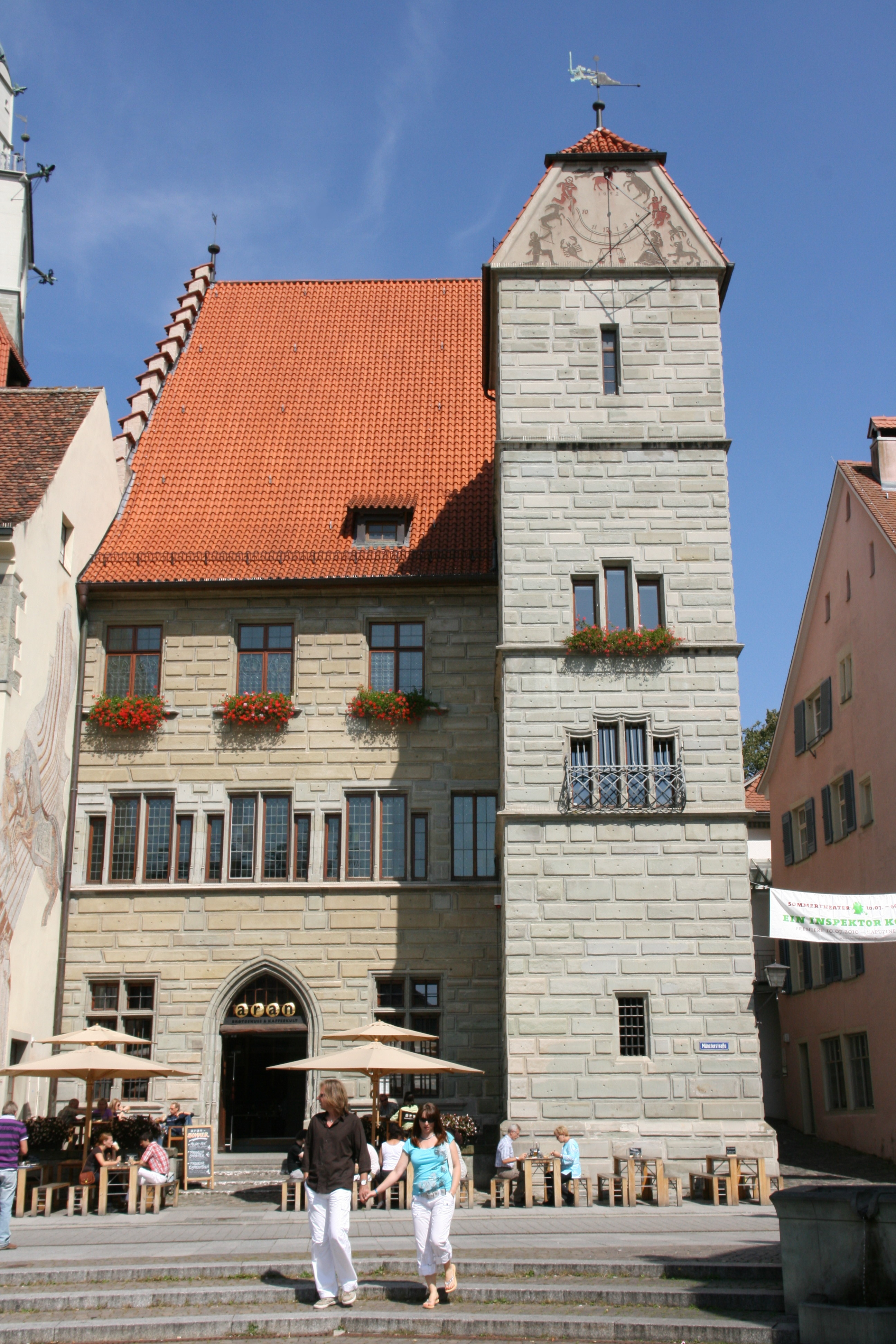 Pfennigtum am Rathaus, Ecke Münsterstraße / Pfennigturmgasse in Überlingen